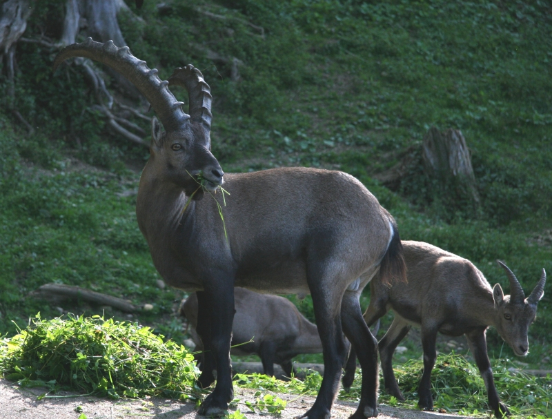 Alpine Ibex (Capra ibex)